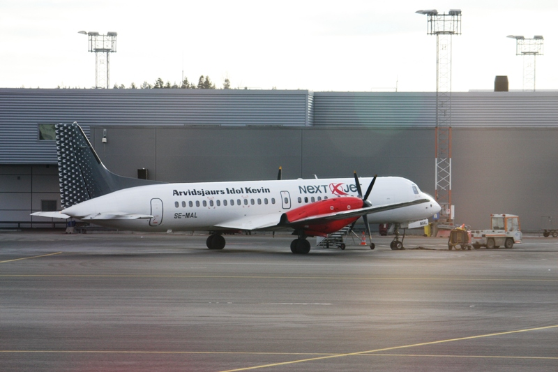 Nextjet BAe ATP